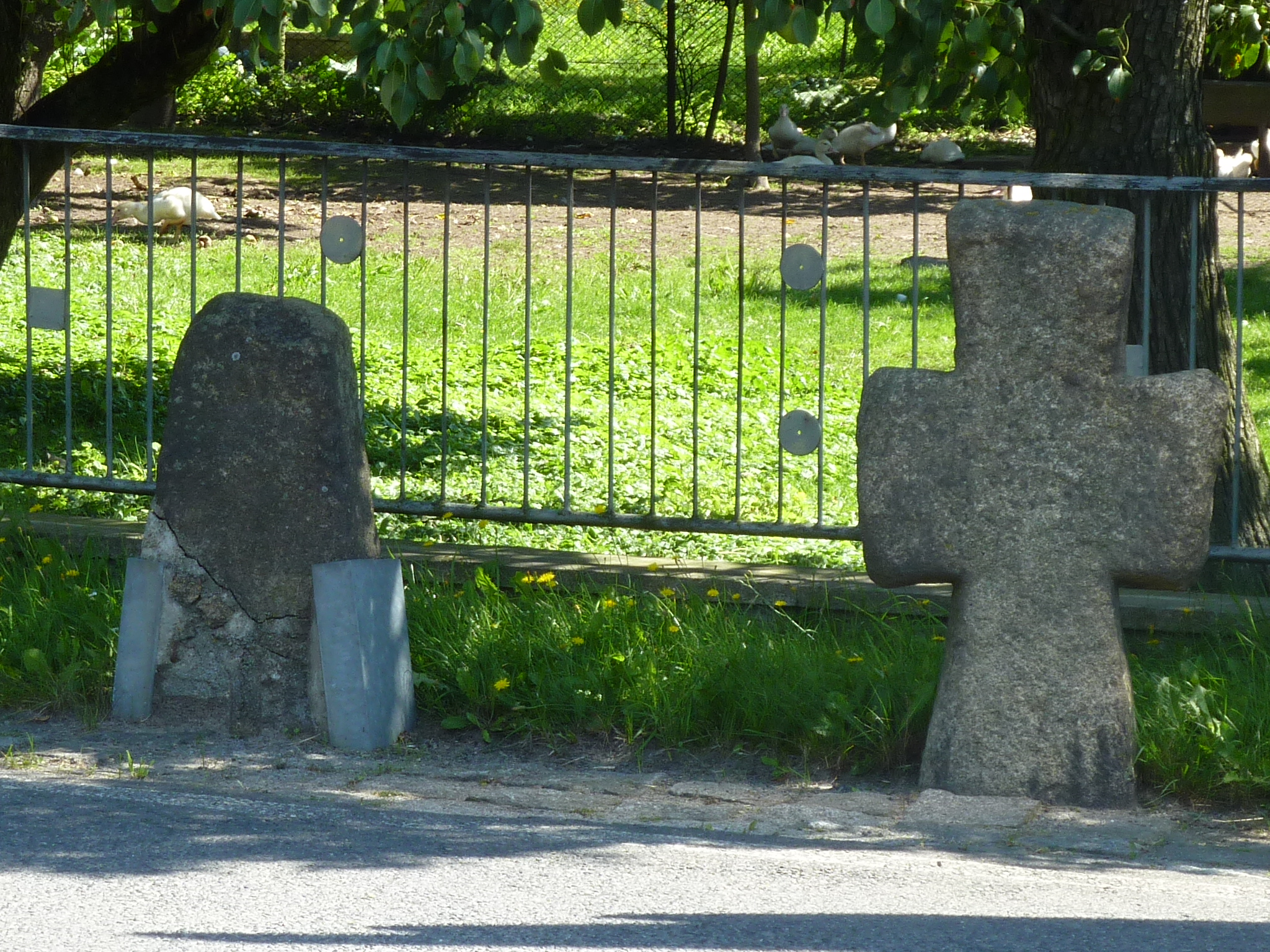 Steinkreuze in Steinitz in der Gemeinde Lohsa, Sachsen